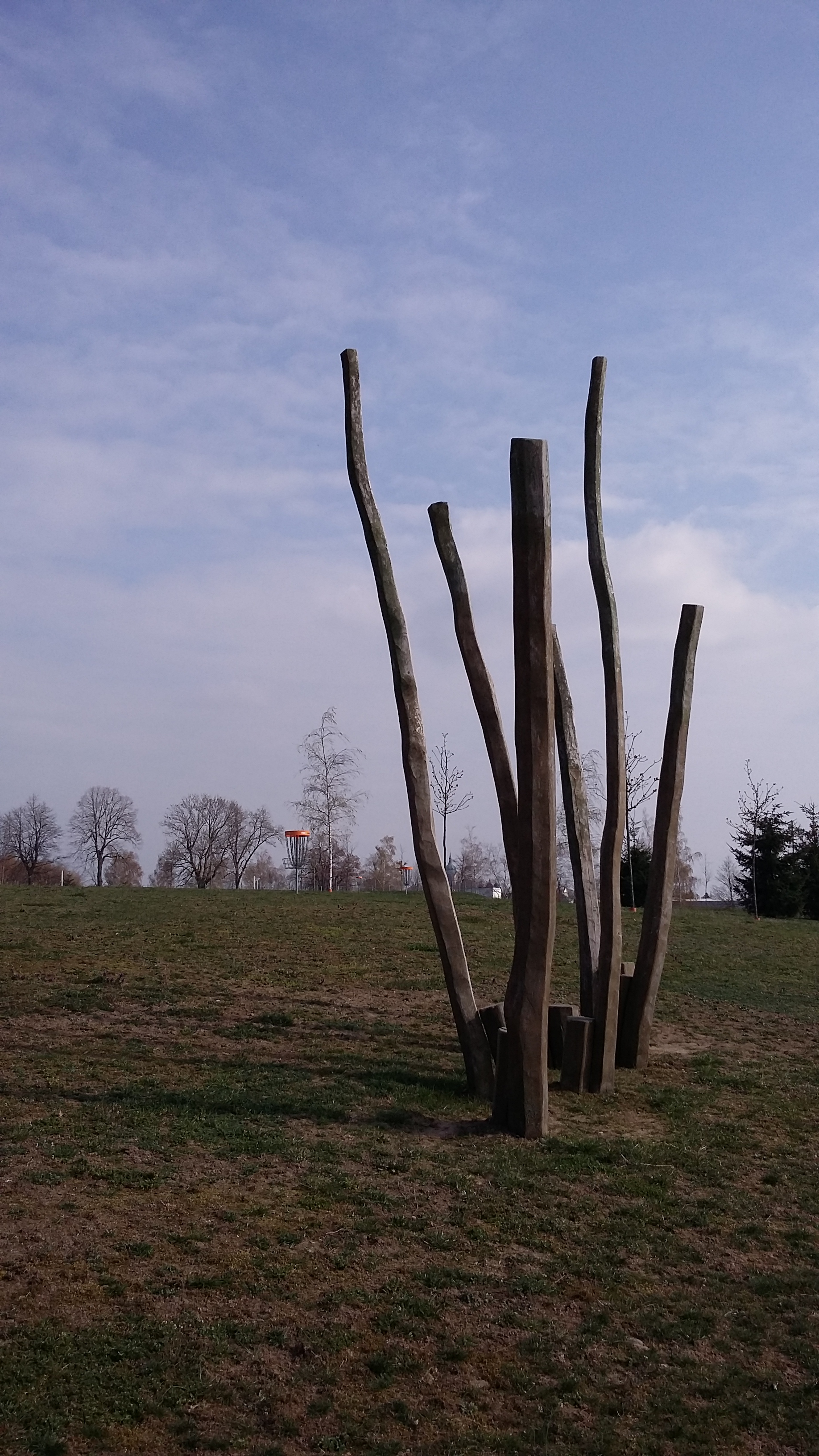 Balanční dráha, rekreační areál Pilák, Pilská vodní nádrž, Žďár nad Sázavou.